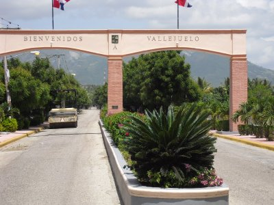 Entrada al municipio de Vallejuelo.